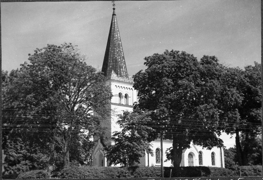 Kyrkan från sydväst.